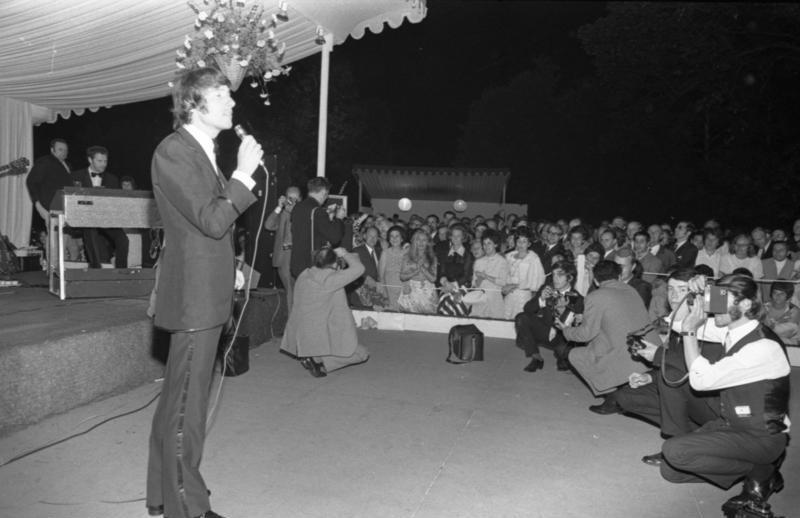 Sommerfest des Bundeskanzlers im Park des Palais Schaumburg